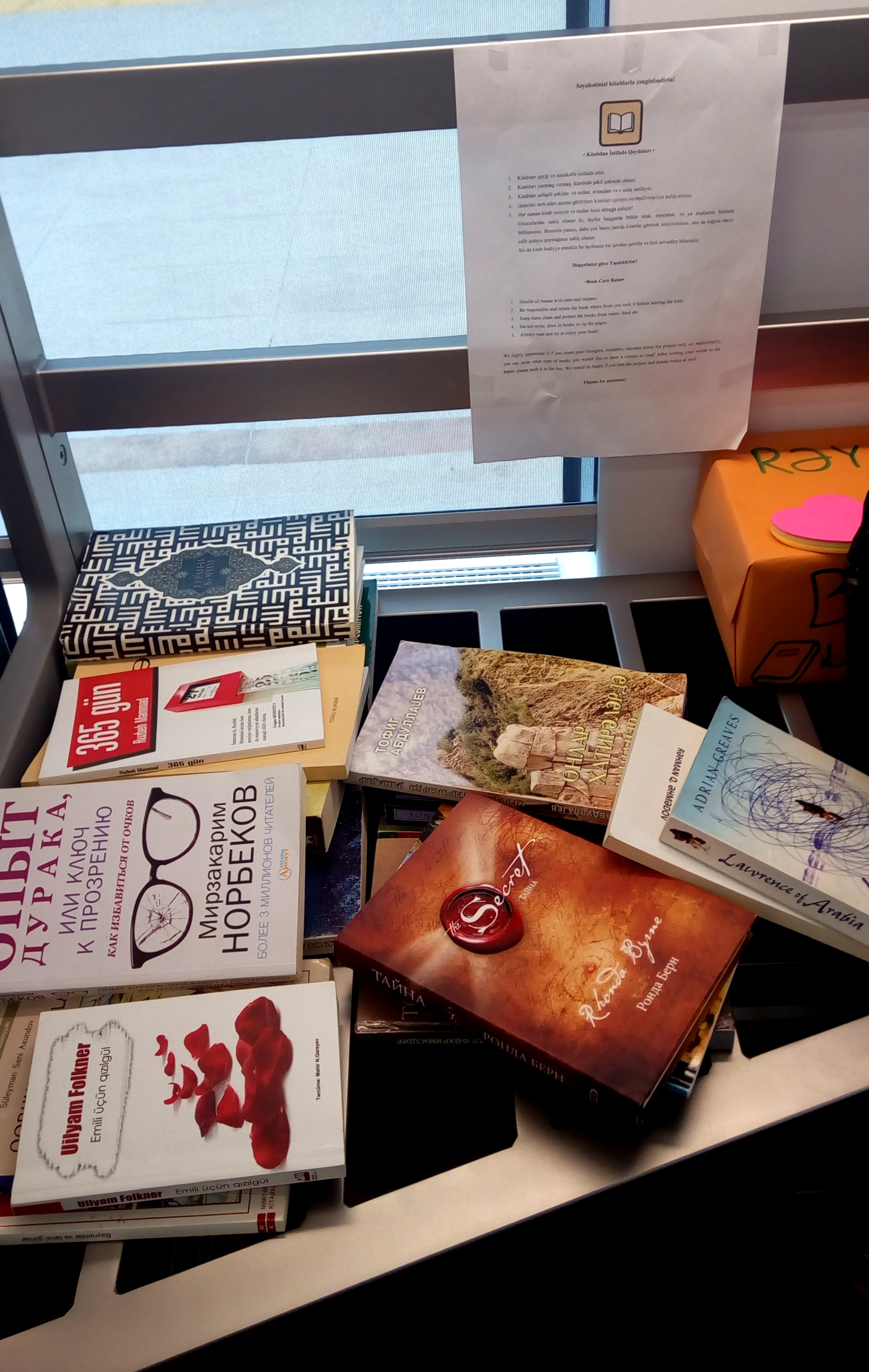 Bakı-Sumqayıt qatarında Bookology